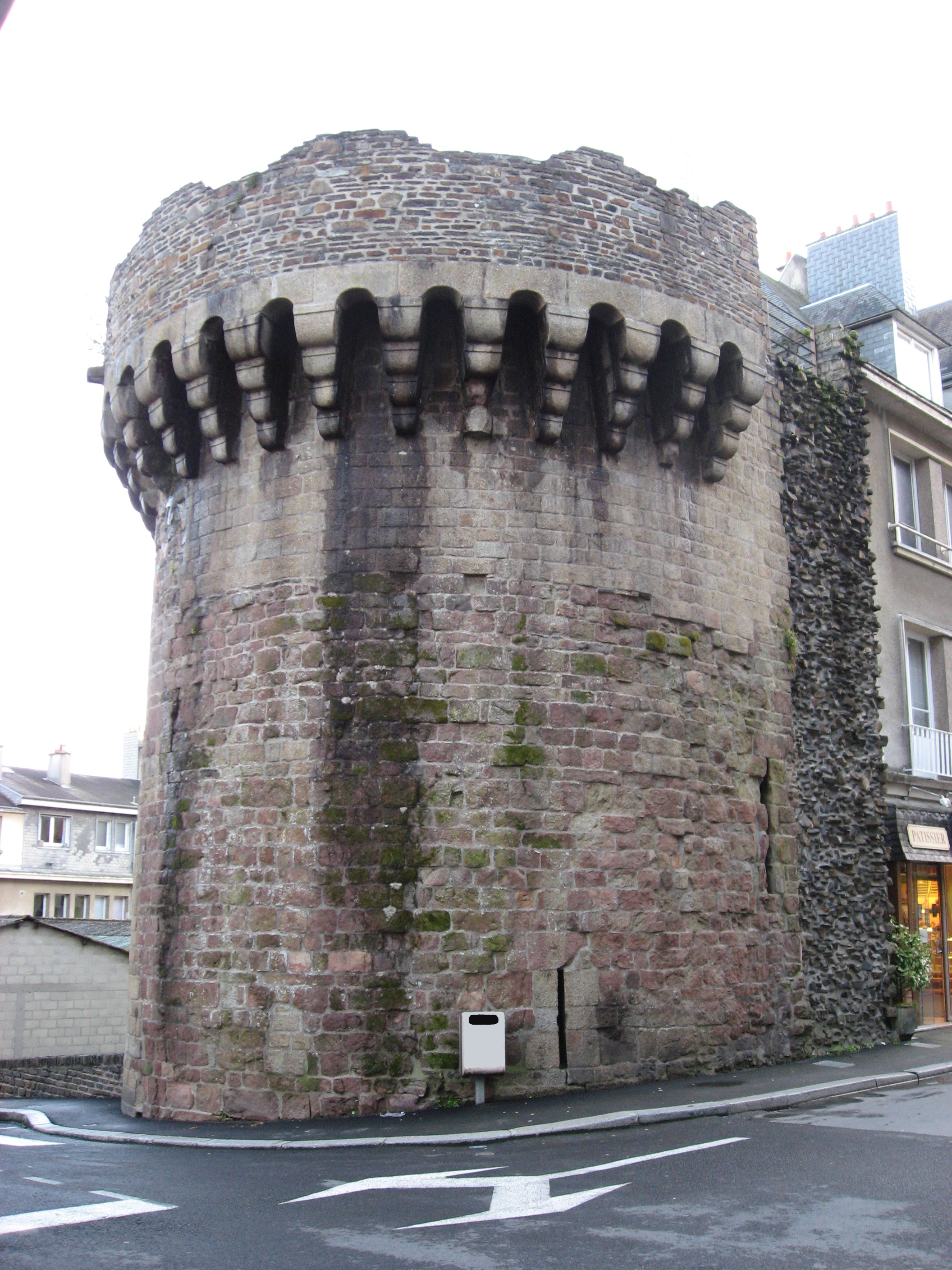 La Tour Saint-Sauveur, à Vire, Normandie, France.